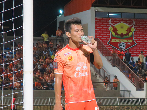 Yuttapong Srilakorn